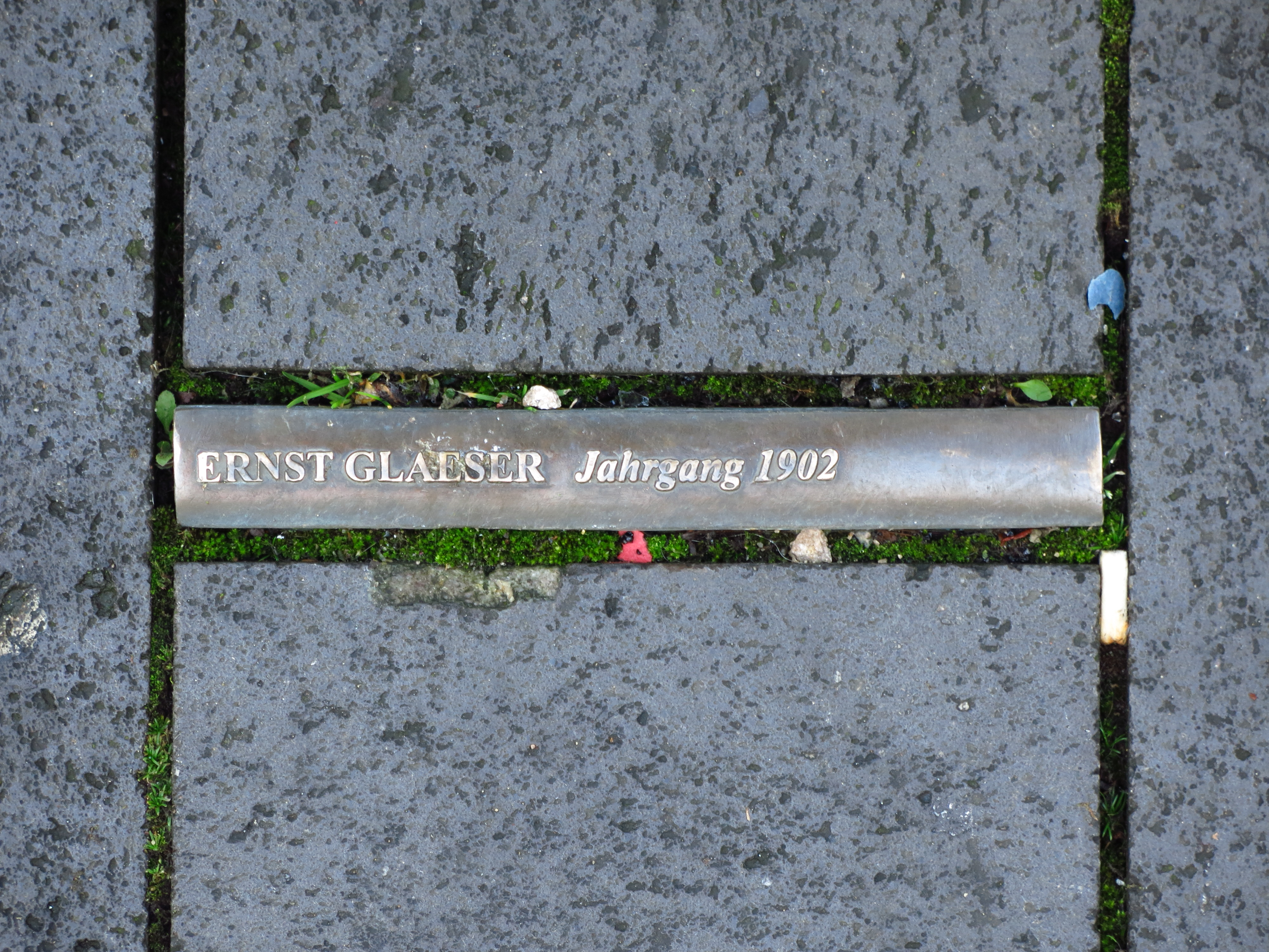 Das Mahnmal zur Bücherverbrennung auf dem Bonner Markt; In das Pflaster des Bonner Markt sind insgesamt 60 sichtbare Buchrücken, sogenannte „Lesezeichen“, verteilt, die sich an der Rathaustreppe, dem Ort an dem die Bücher am 10. Mai 1933 verbrannt wurden, verdichten. Zusätzlich wurde ein wetterfester Archiv-Behälter in Form einer Büchertruhe in den Platz eingelassen. Seine Inschrift benennt das Ereignis und weitere Autoren von verbrannten Büchern.